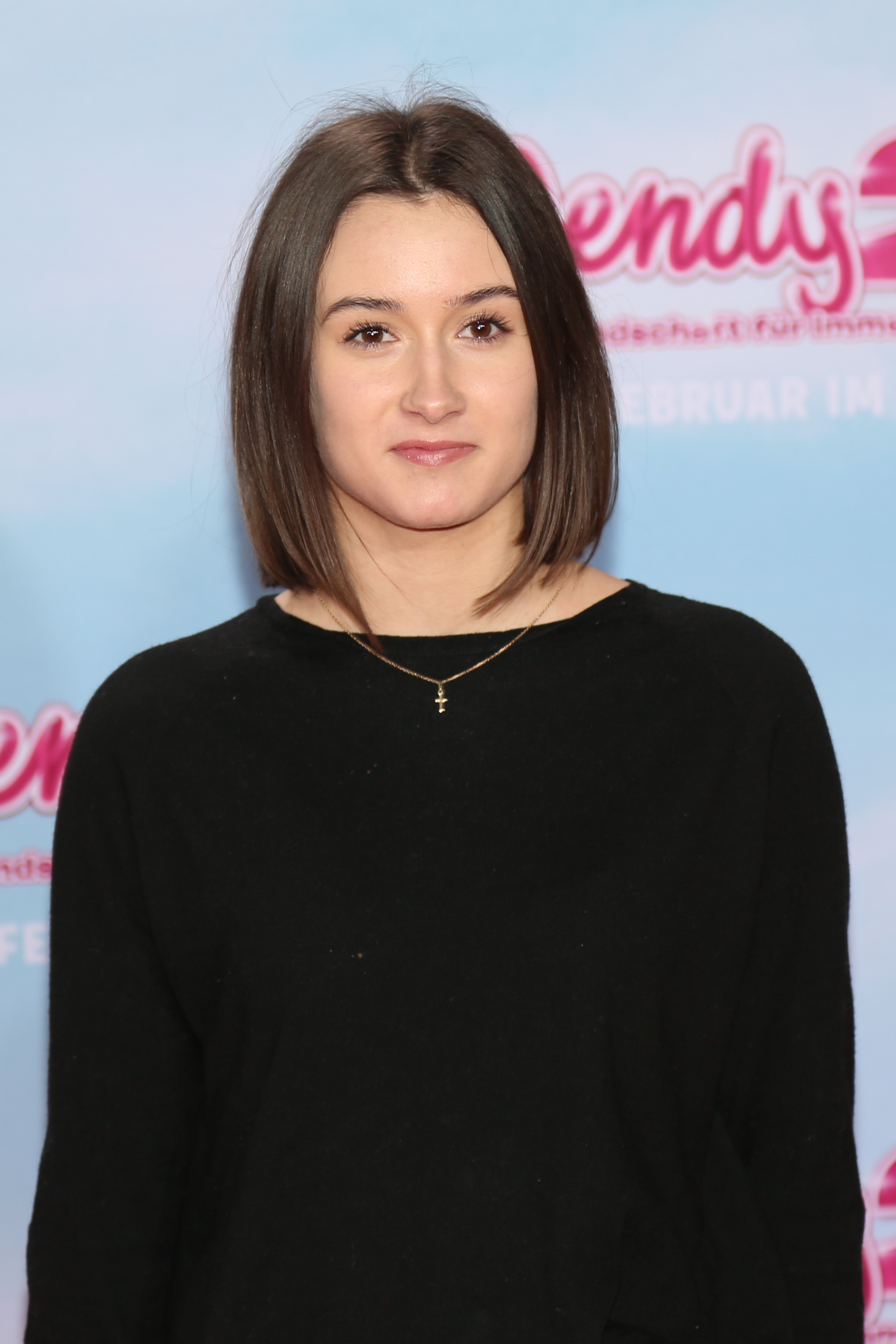 Influencer Laura Roge bei der Premiere von Wendy 2, im Februar 2018.